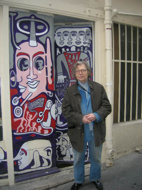 Yvon Taillandier devant la porte de son atelier parisien rue de l'Agent Bailly à Paris en 2006 - Photo Frédéric ELIN